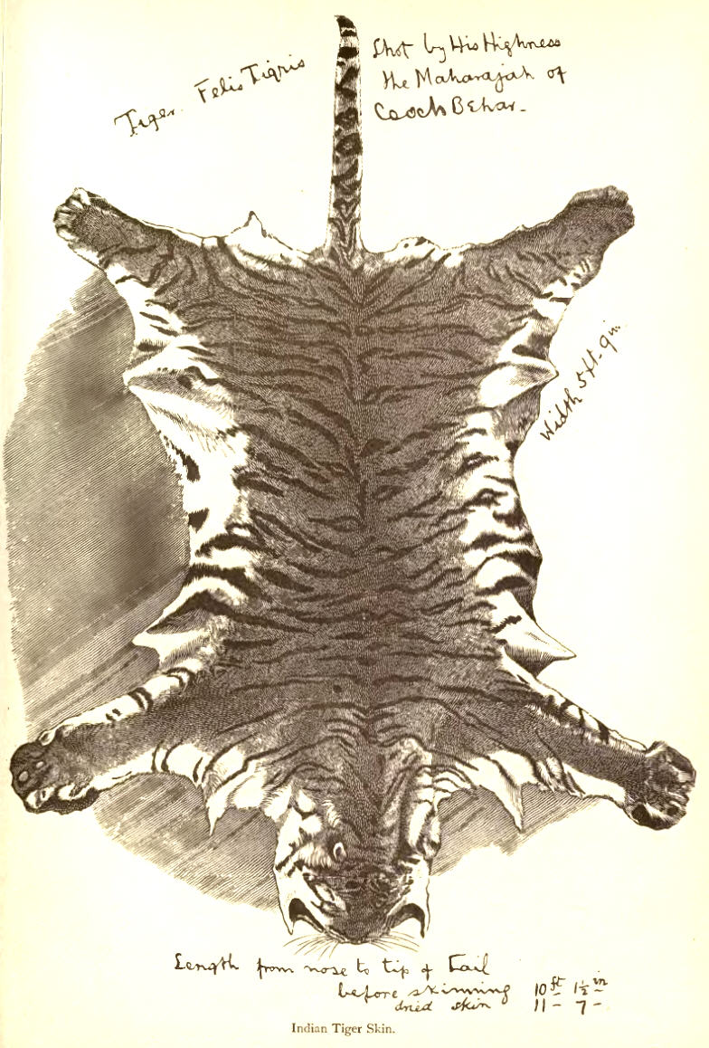 A record tiger skin